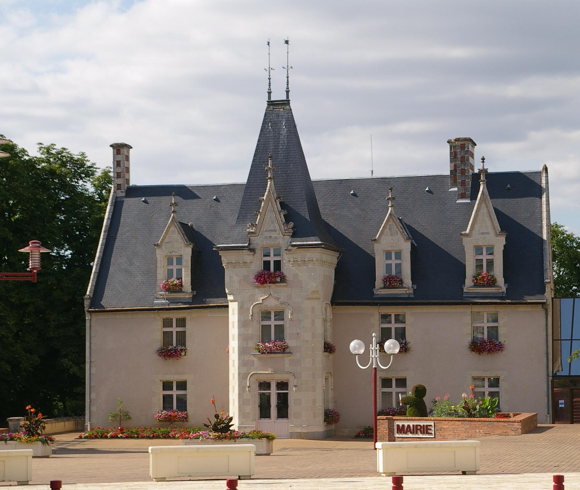 Bürgermeisteramt von Montreuil-Juigné.